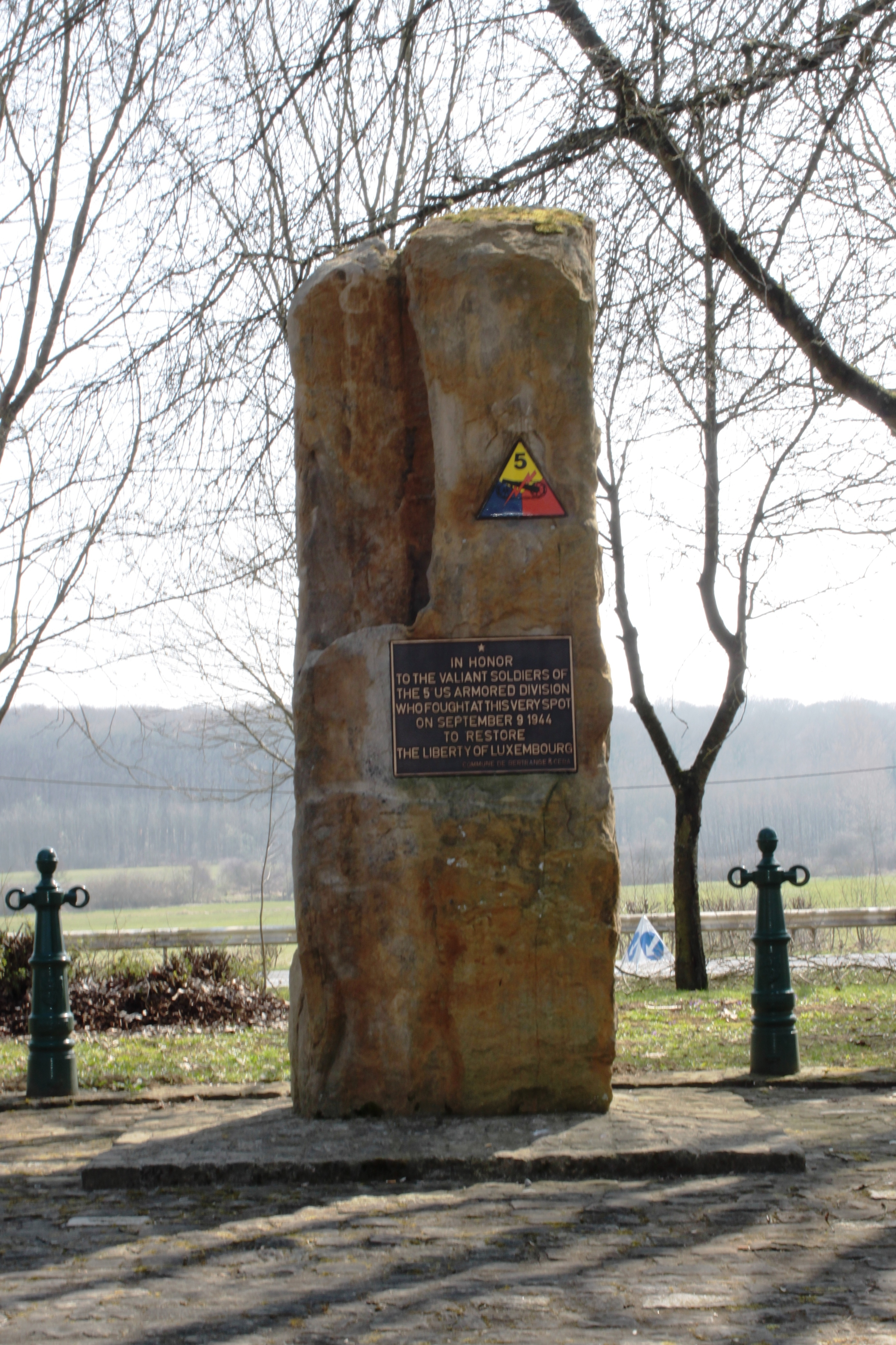 Monument fir déi 5. US Armored Division bei der Gréivelsbarrière zu Bartreng